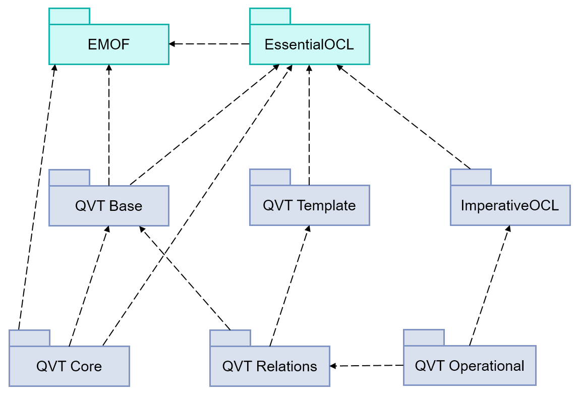 Construction des métamodèles du standard QVT (en bleu) à partir des métamodèles EMOF et OCL existants (en vert).